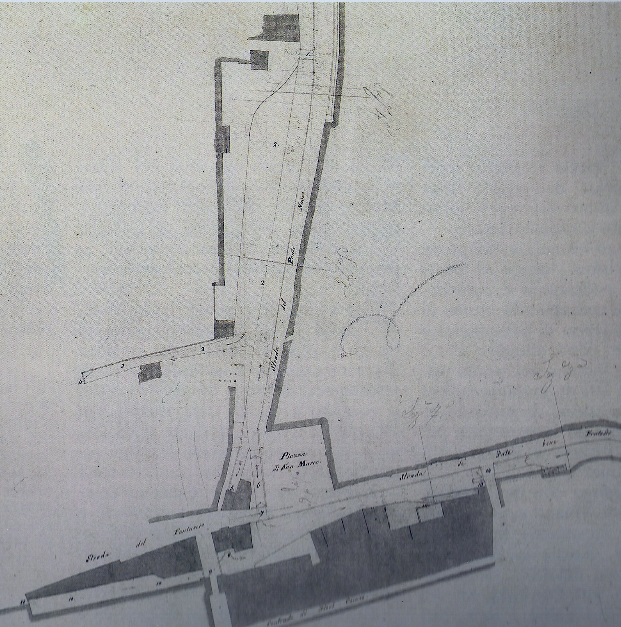 Milano, il laghetto di san Marco nel particolare di un foglio d'archivio (1818) del Genio Civile